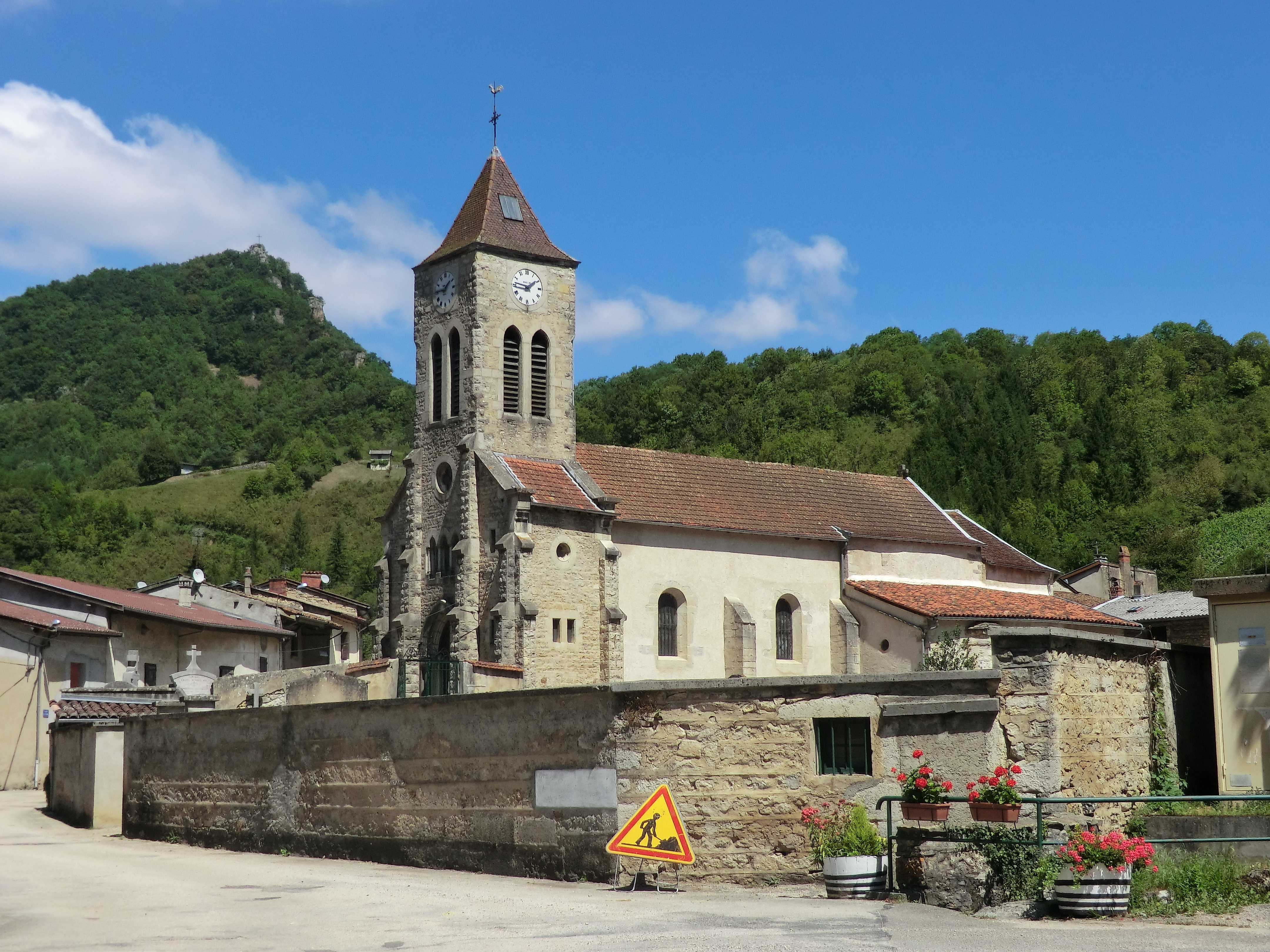 Vue de l'église de Torcieu et de son cimetière.